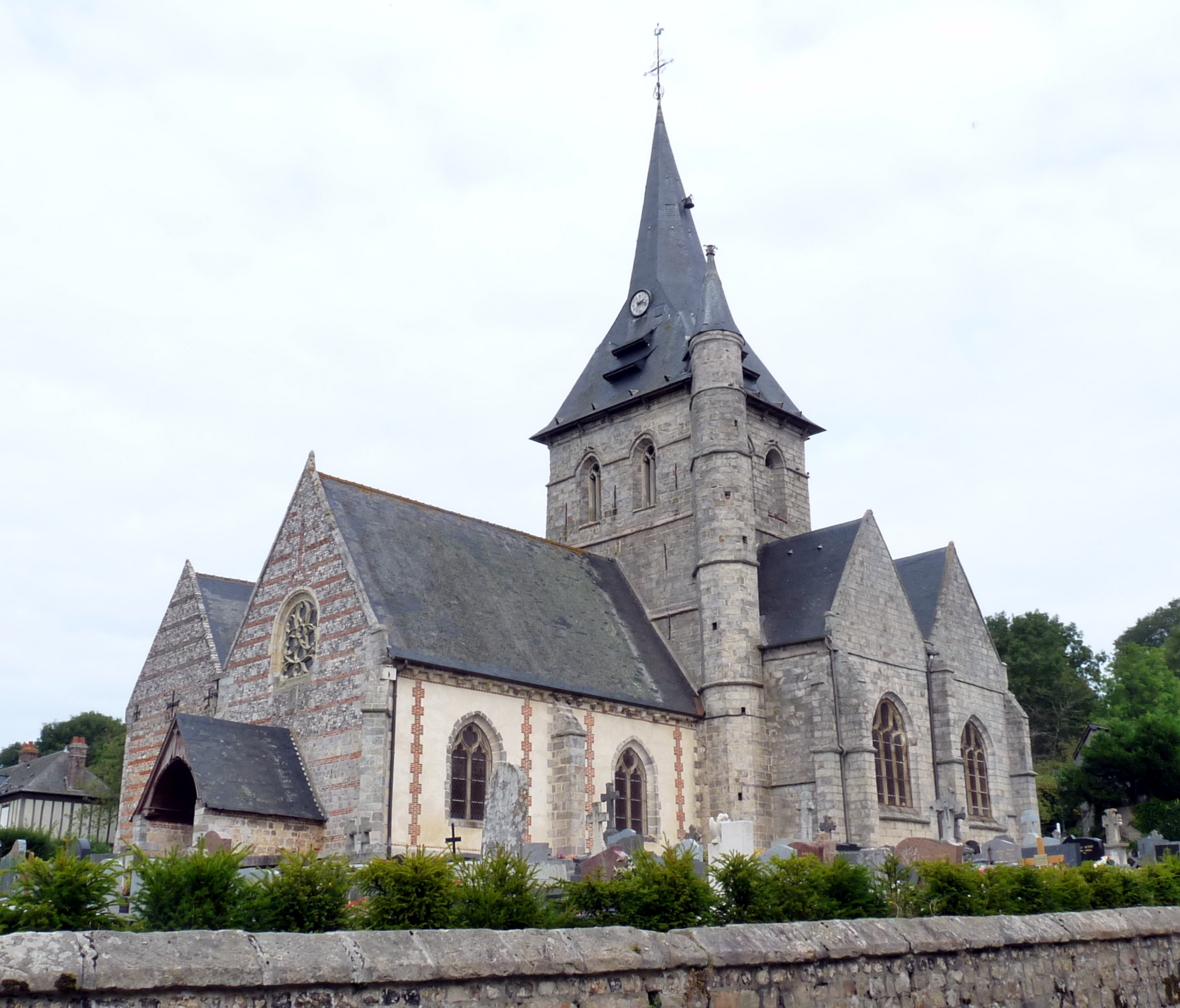 Église Saint-Pierre de Longueil (Classé) .